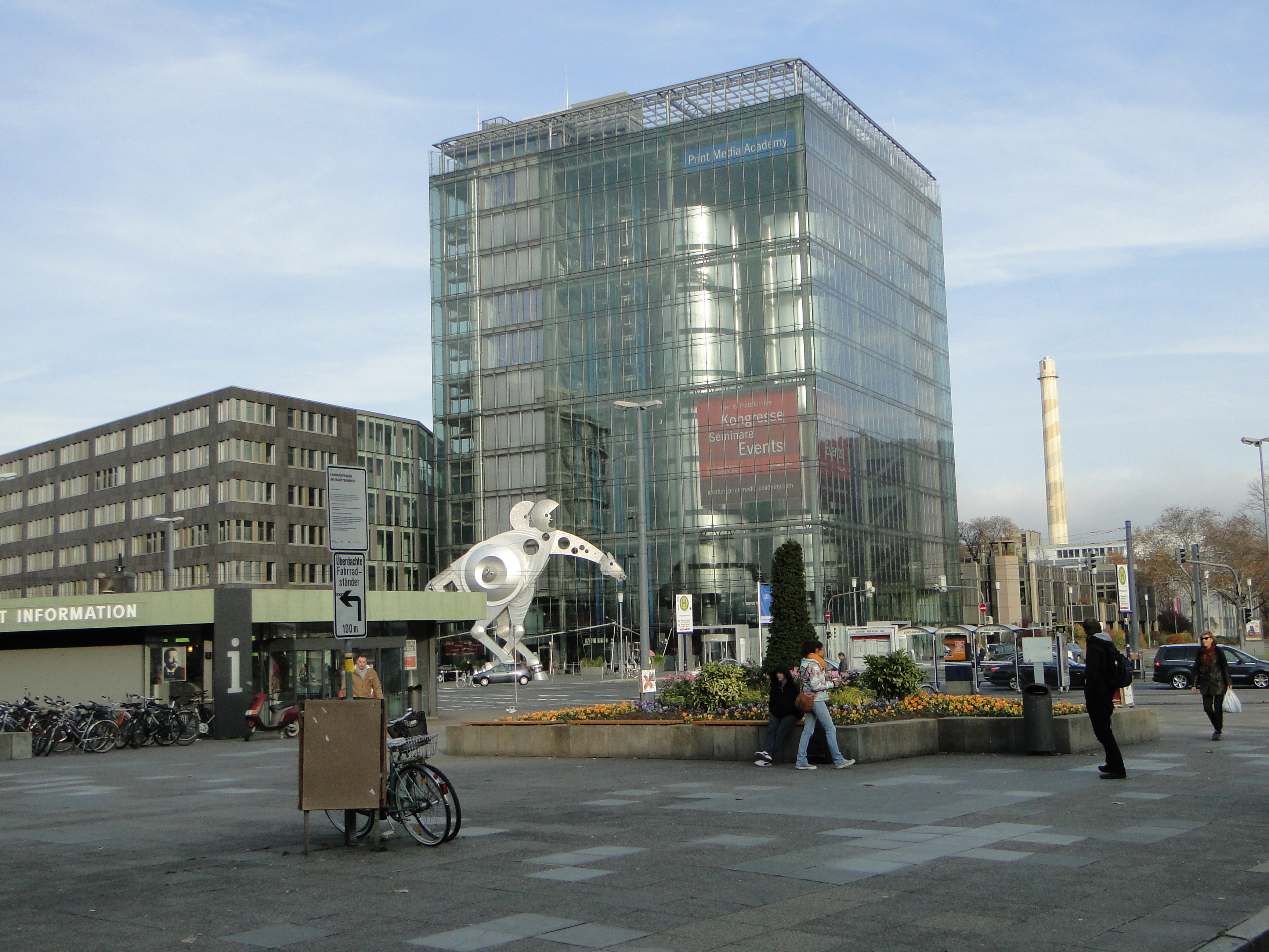 Heidelberg, November 2012